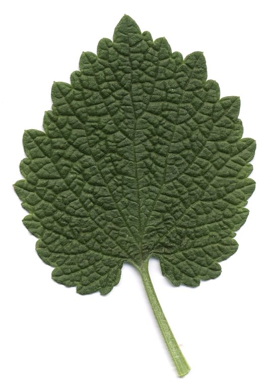 Lamium purpureum - leaf (scan)